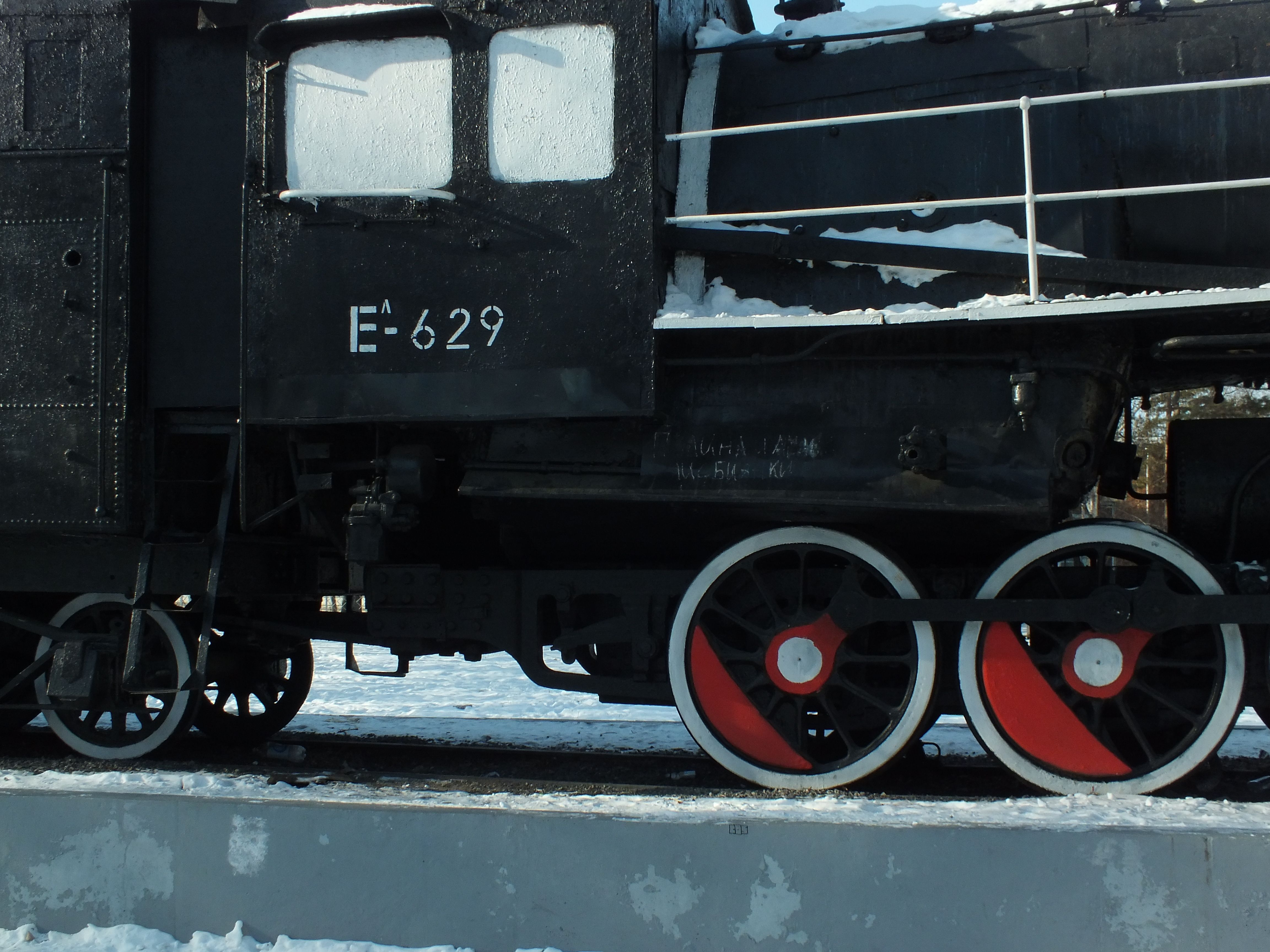 Russian locomotive Ел-629